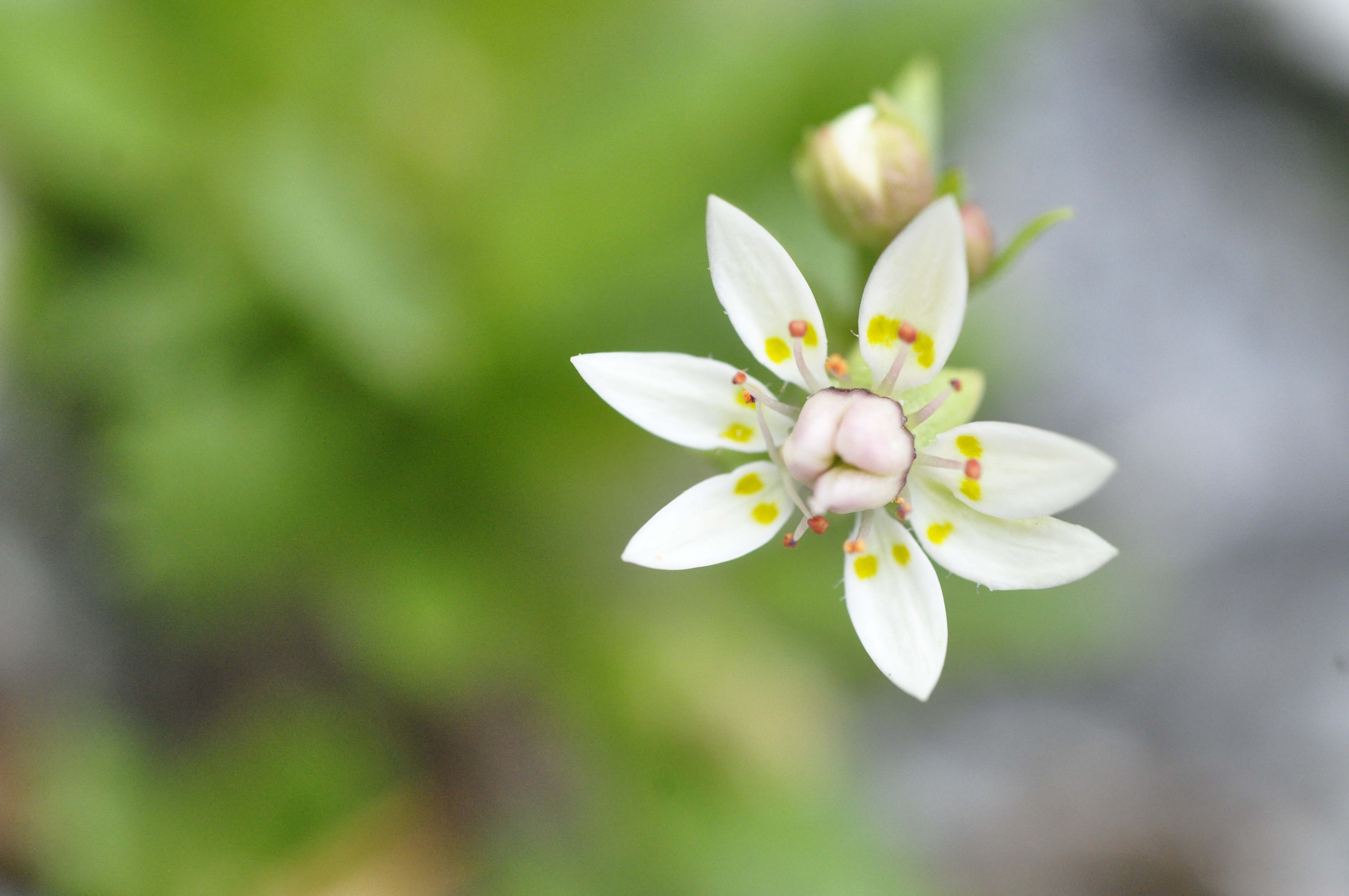 En av fjällets blommor, Stjärnbräckan